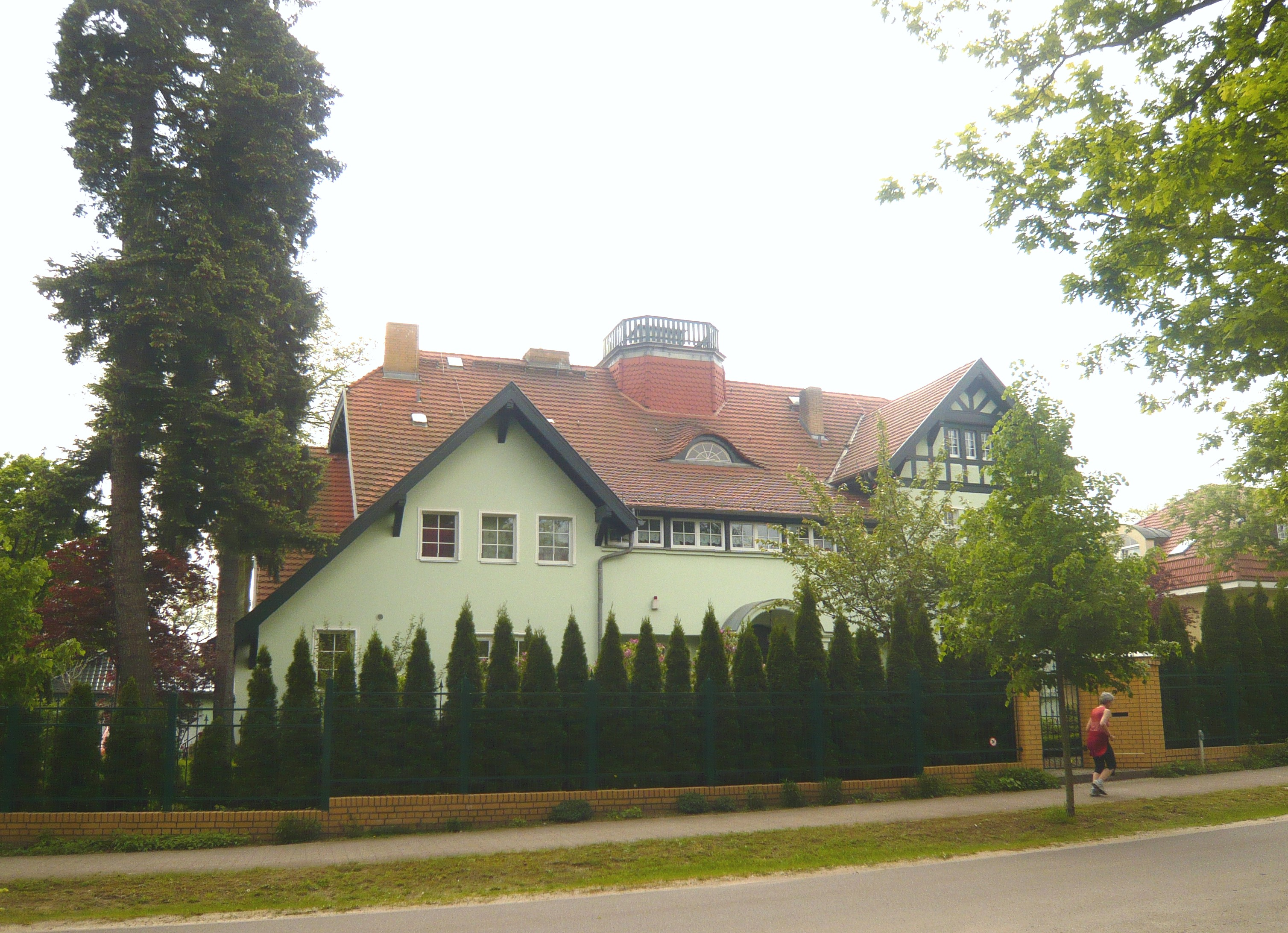 Gemeinde Wandlitz, Ortsteil Wandlitzsee: An den Pfühlen, eh. Kinderheim